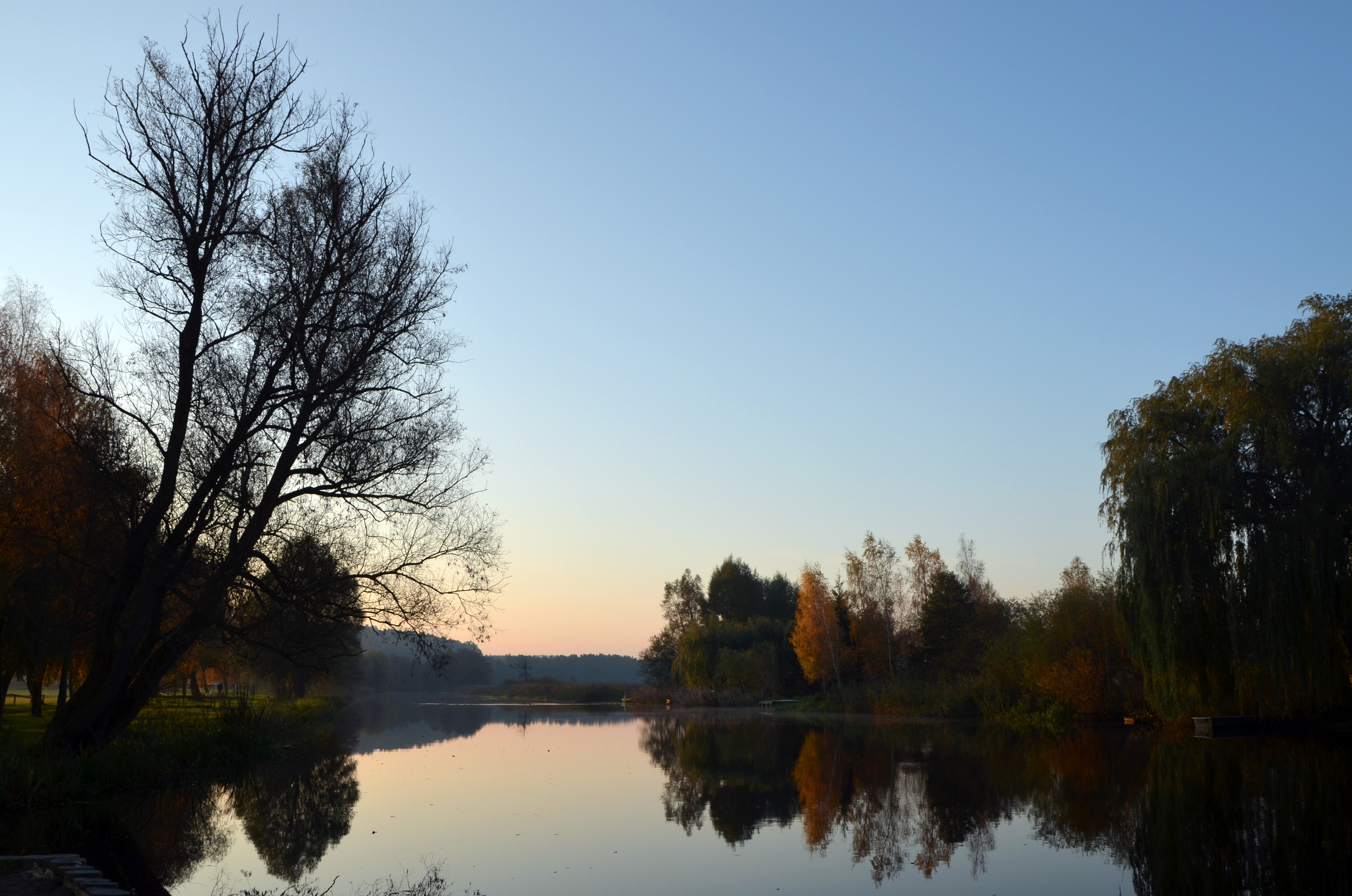 Warnow in Schwaan